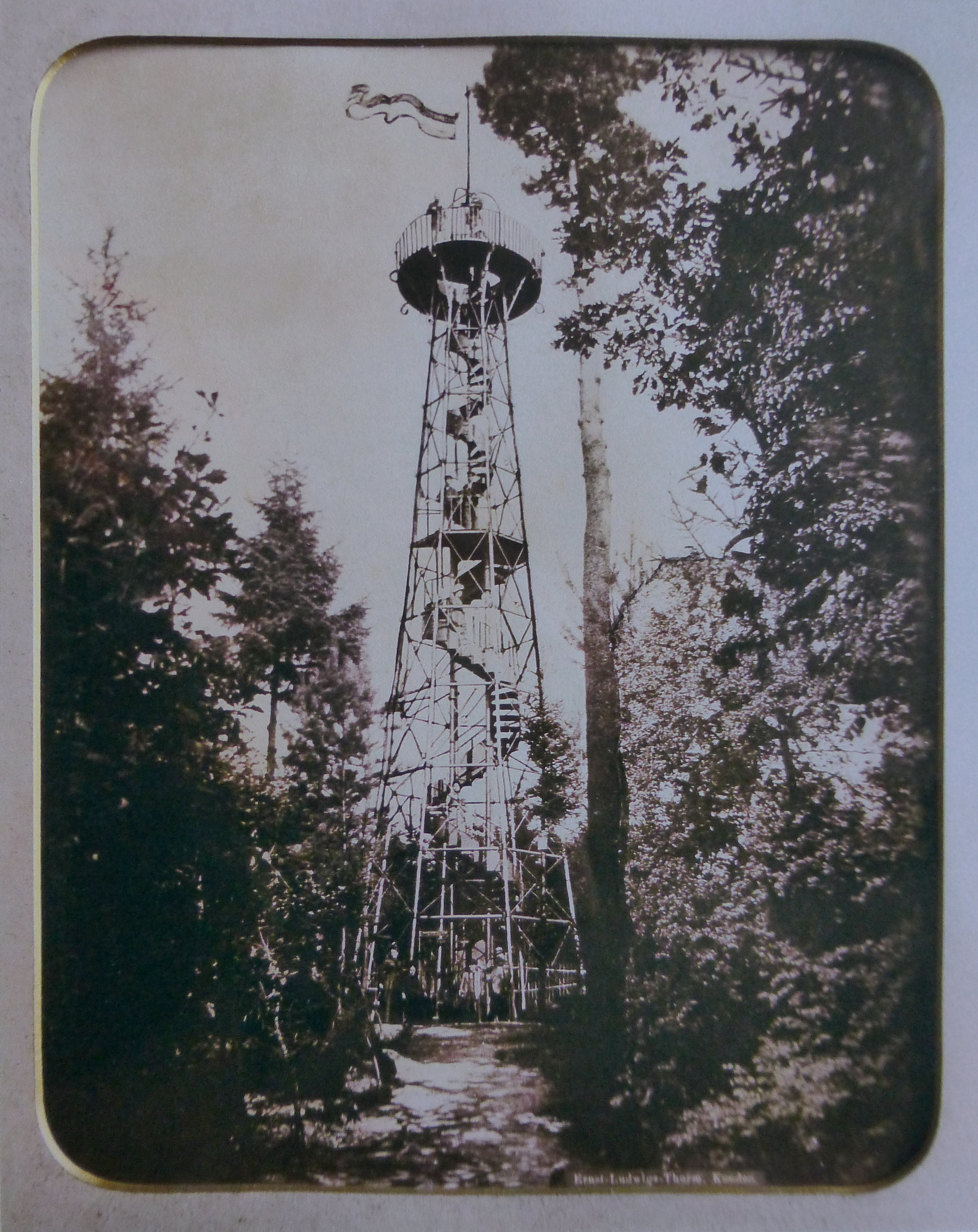 Reproduktion eines historischen Fotos des Ernst-Ludwig-Turms bei Knoden vom Jahr der Einweihung 1886